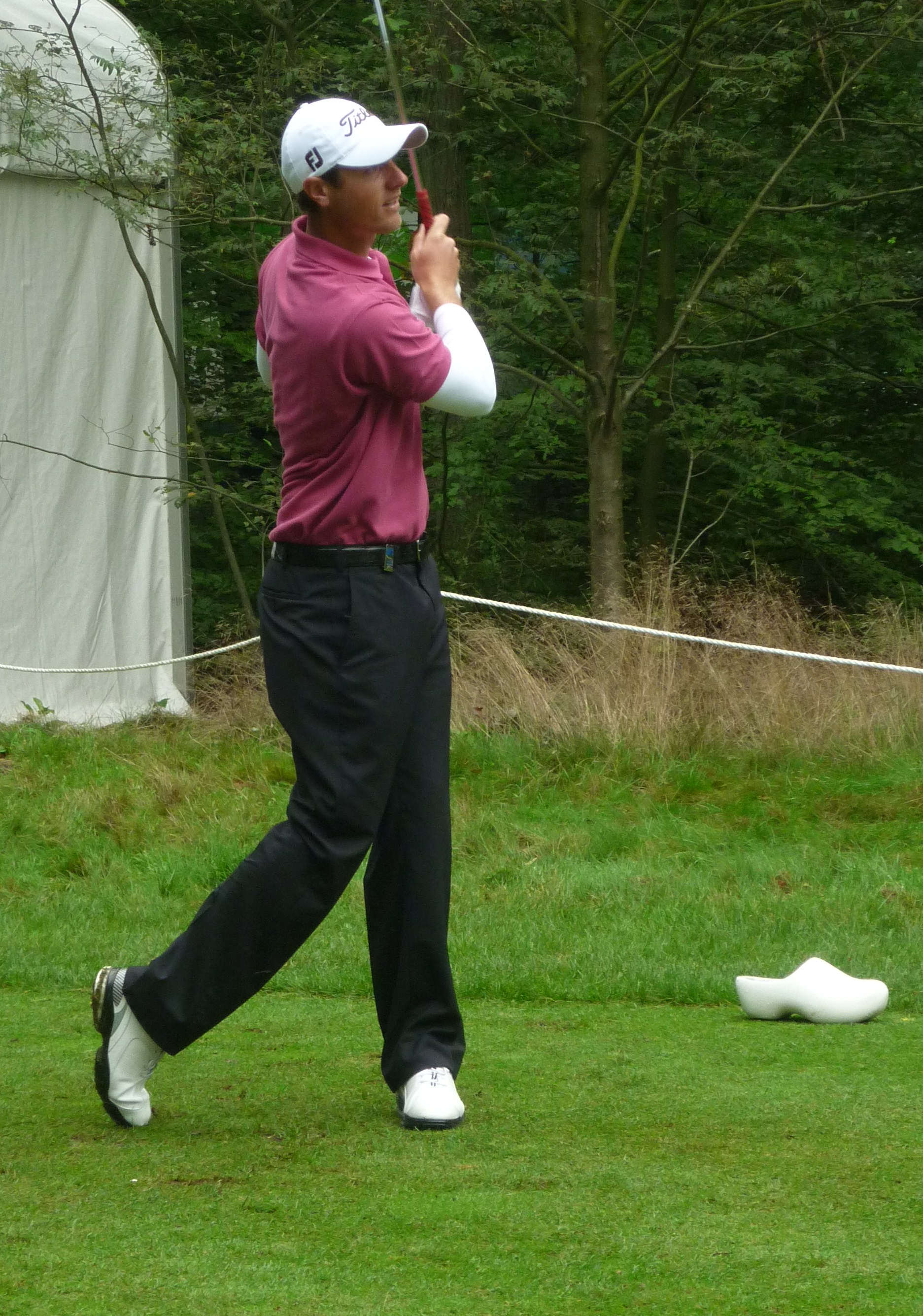 Nicoles Colsaerts op KLM_Open_2010